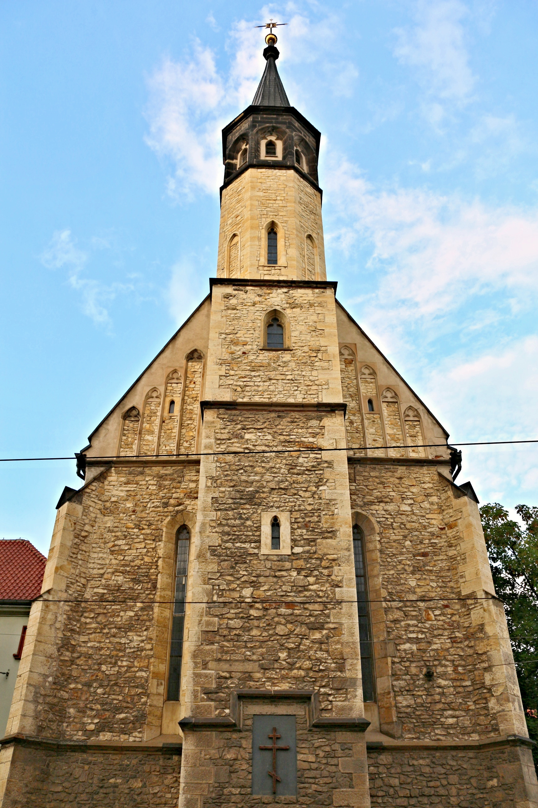 Kostel Zvěstování Panny Marie Na trávníčku (Na slupi)